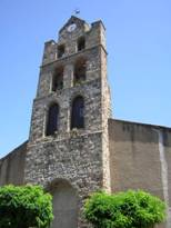 L'un des cinq clochers du village